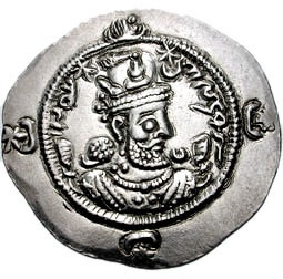 Dracma do xá sassânida Hormisda IV